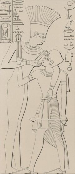 Abzeichnung eines Reliefs im Tempel Bet el-Wali, Ägypten